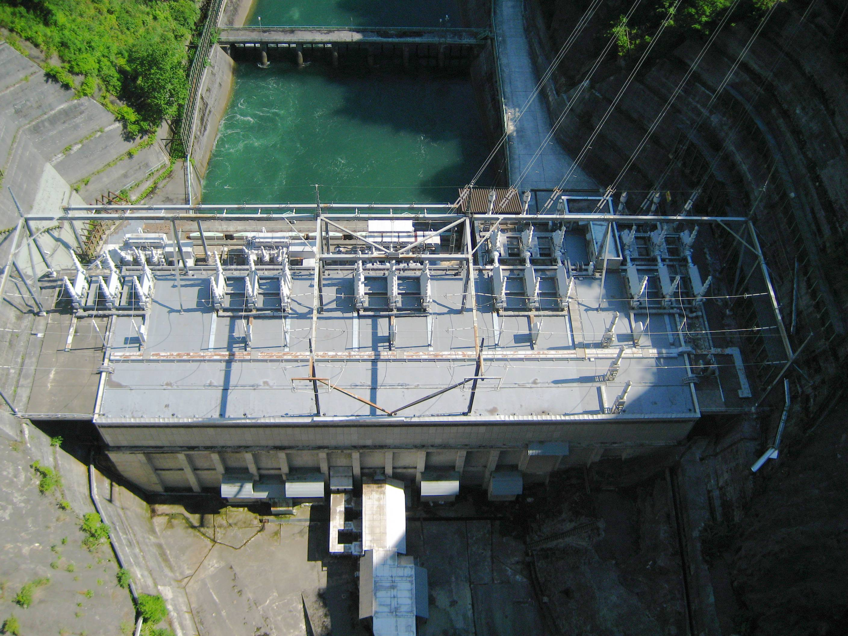 Yagisawa Dam (矢木沢ダム) in Minakami, Gunma, Japan.